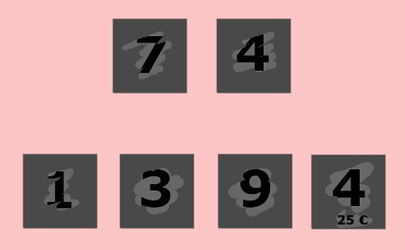 Win4Life krasspel (vereenvoudigd!)